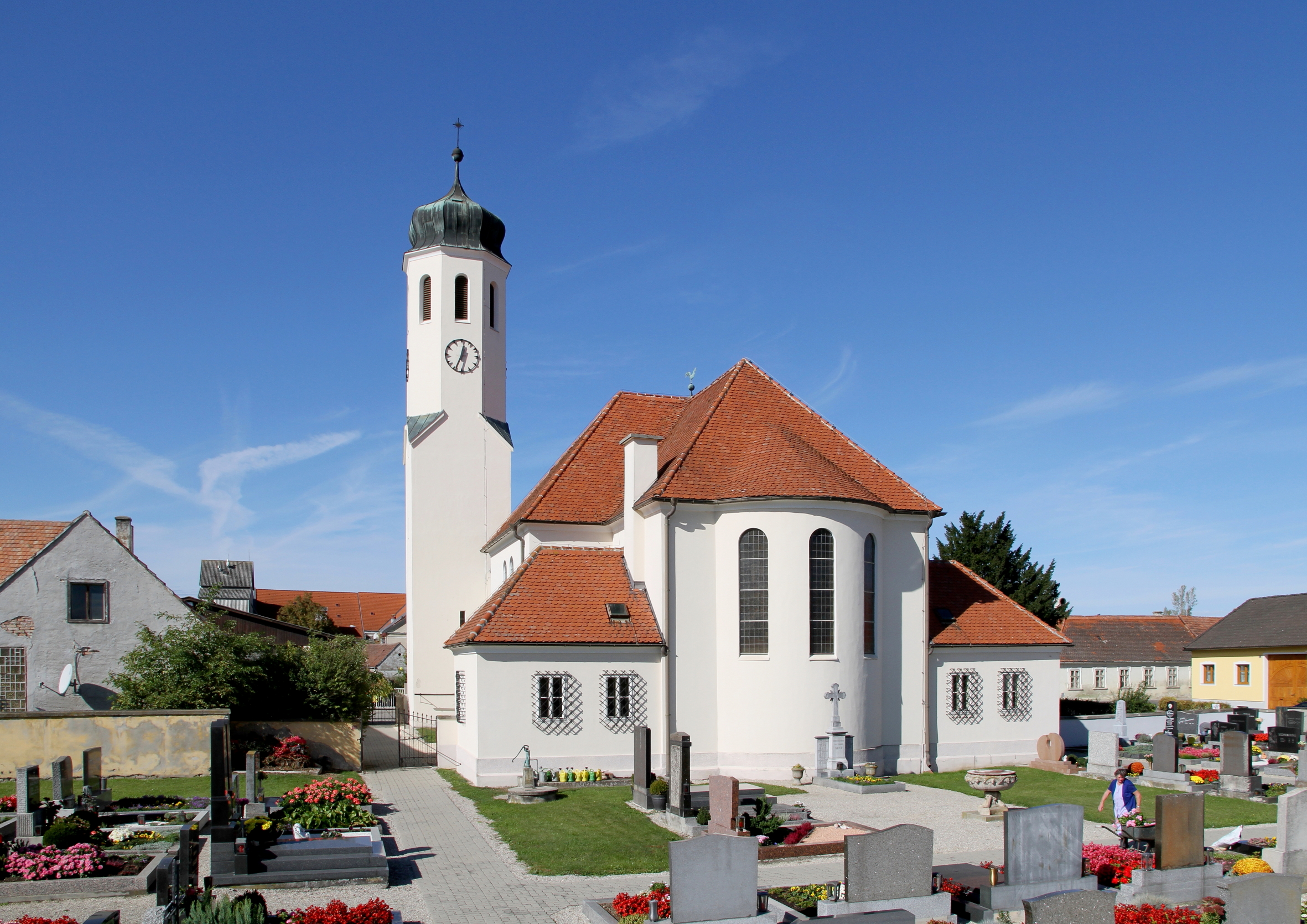 Die katholische Pfarrkirche hl. Martin in Rust im Tullnerfeld, eine Ortschaft der niederösterreichischen Marktgemeinde Michelhausen. Eine nach Plänen von Karl Holey in den Jahren 1947 bis 1949 errichtete Saalkirche mit kurzen Querarmen, Turm und Taufkapelle. Ursprünglich stand an dieser Stelle eine Kirche mit romanischem Langhaus und gotischem Chor, die im Zuge des 2. Weltkrieges zerstört wurde.